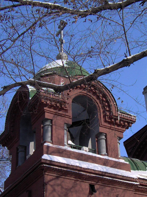 哈尔滨圣母帡幪教堂钟楼